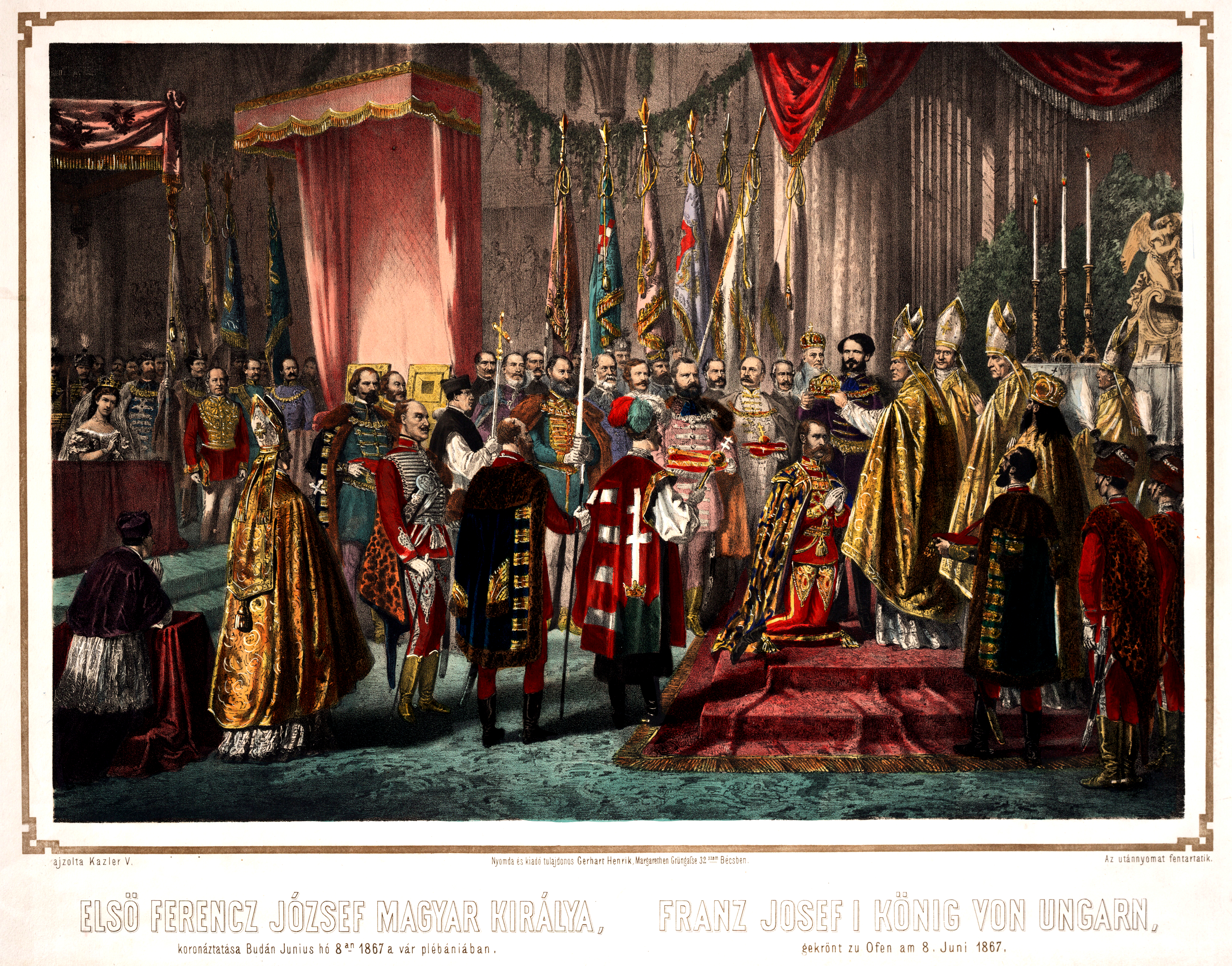 Elsö Ferencz József magyar király koronáztatása Budán 1867. június 8-án a budai vár plébániájában